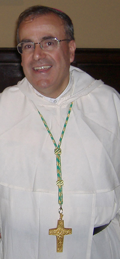 Paul Cremona - Bishop - Malta